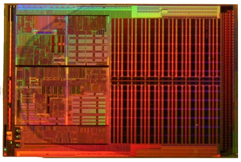 Der Silizium-Chip (Die) eines AMD Opteron 8xx. Nahezu zwei Drittel der Chip-Oberfläche belegt der 1 MB große Level 2 Cache (L2 Cache). Auf der linken Seite ist der eigentliche Prozessor-Kern (Core) zu sehen, der in drei Bereiche untergliedert ist. Im oberen Teil ist oben die Fließkommaeinheit (Floating Point Unit) angeordnet, links unten die beiden Speicher- und Leseeinheiten (Load and Store Units), sowie rechts unten der 64 KB große Level 1 Cache für Daten (L1 Data Cache, helle Rechtecke). Der mittlere Teil enthält links oben die Integer-Einheiten (Integer Units), rechts oben das Bus Interface und rechts unten weitere 64 KB Level 1 Cache für Anweisungen (L1 Instruction Cache).